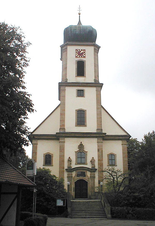 Kirche Mariä Himmelfahrt in Kochertürn. Errichtet 1752, abgebrannt 1809 und 1845.